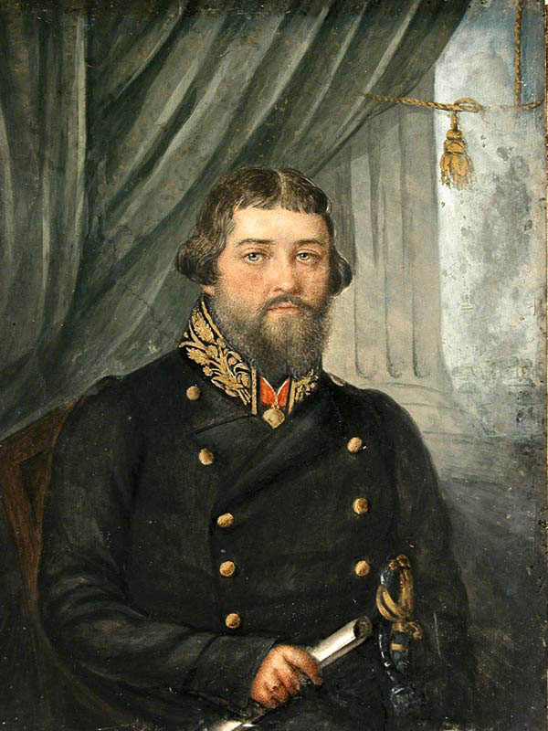 Портрет муромского городского головы купца Титова А. А. Хранится в собрании Казанского университета